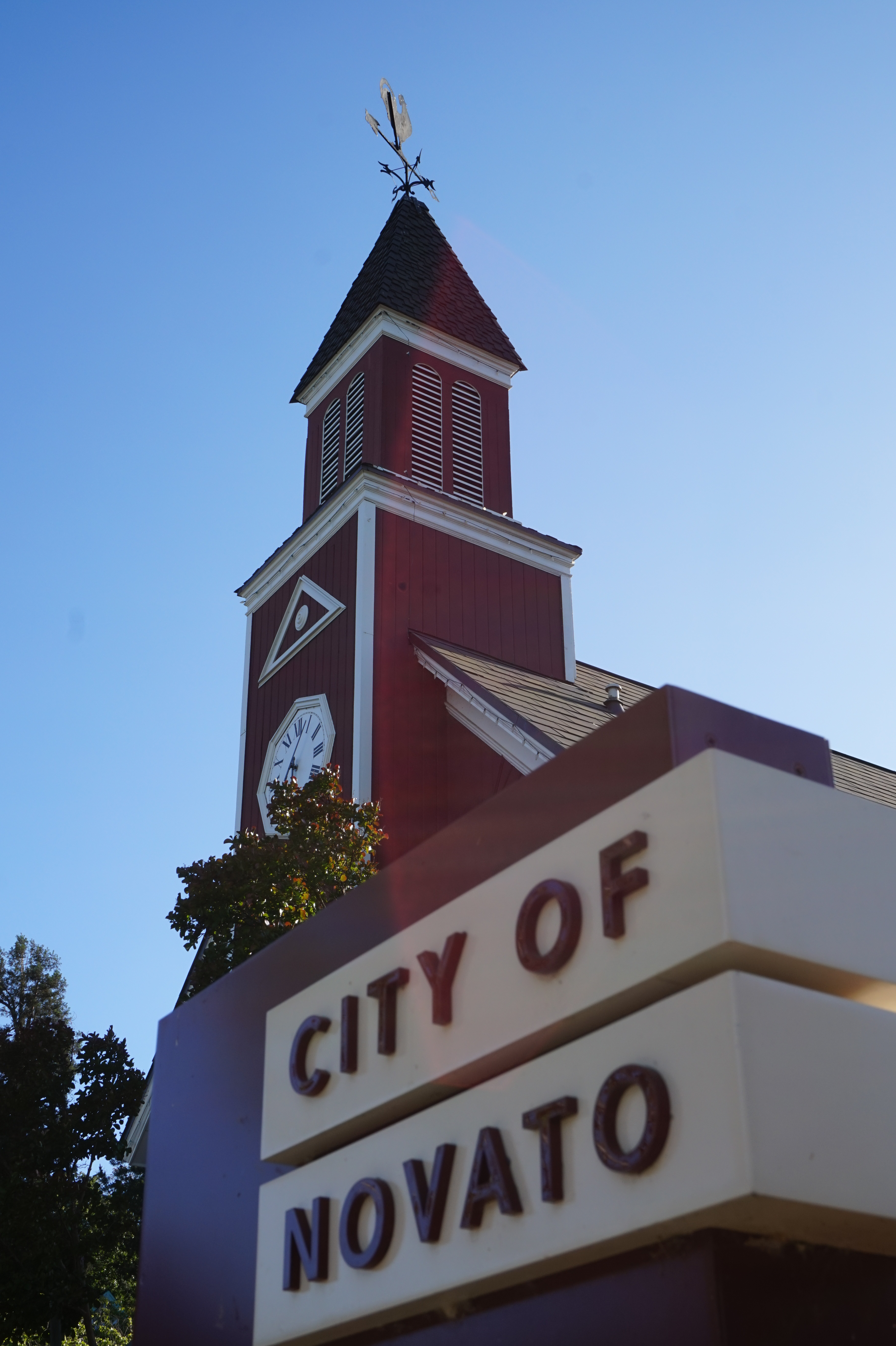 Ситихол (мэрия), Новато